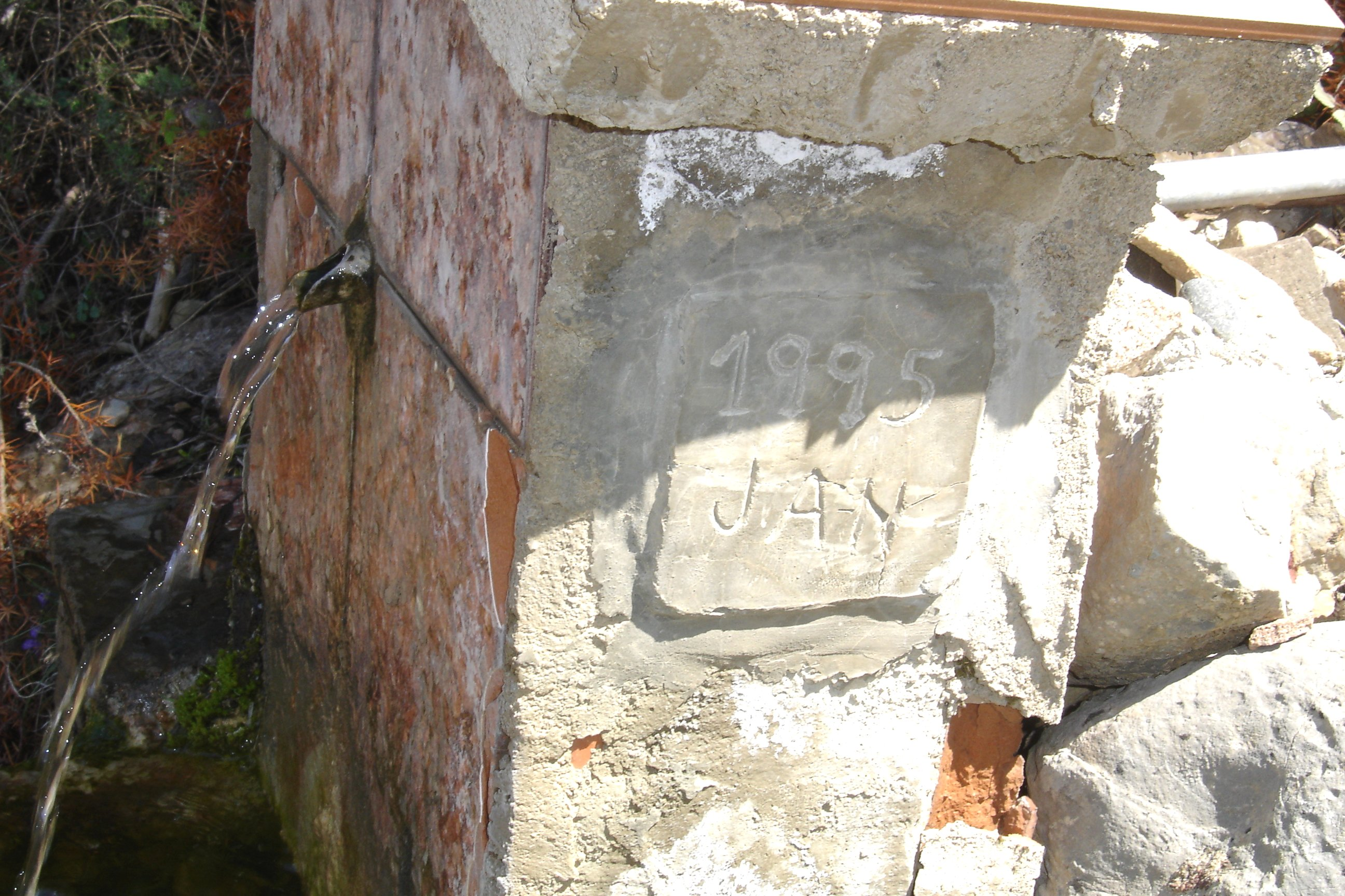 La inscripció que indica la data en que va ser obrada per darrera vegada la font de Sant Isidre, al terme municipal de Guixers (Solsonès).